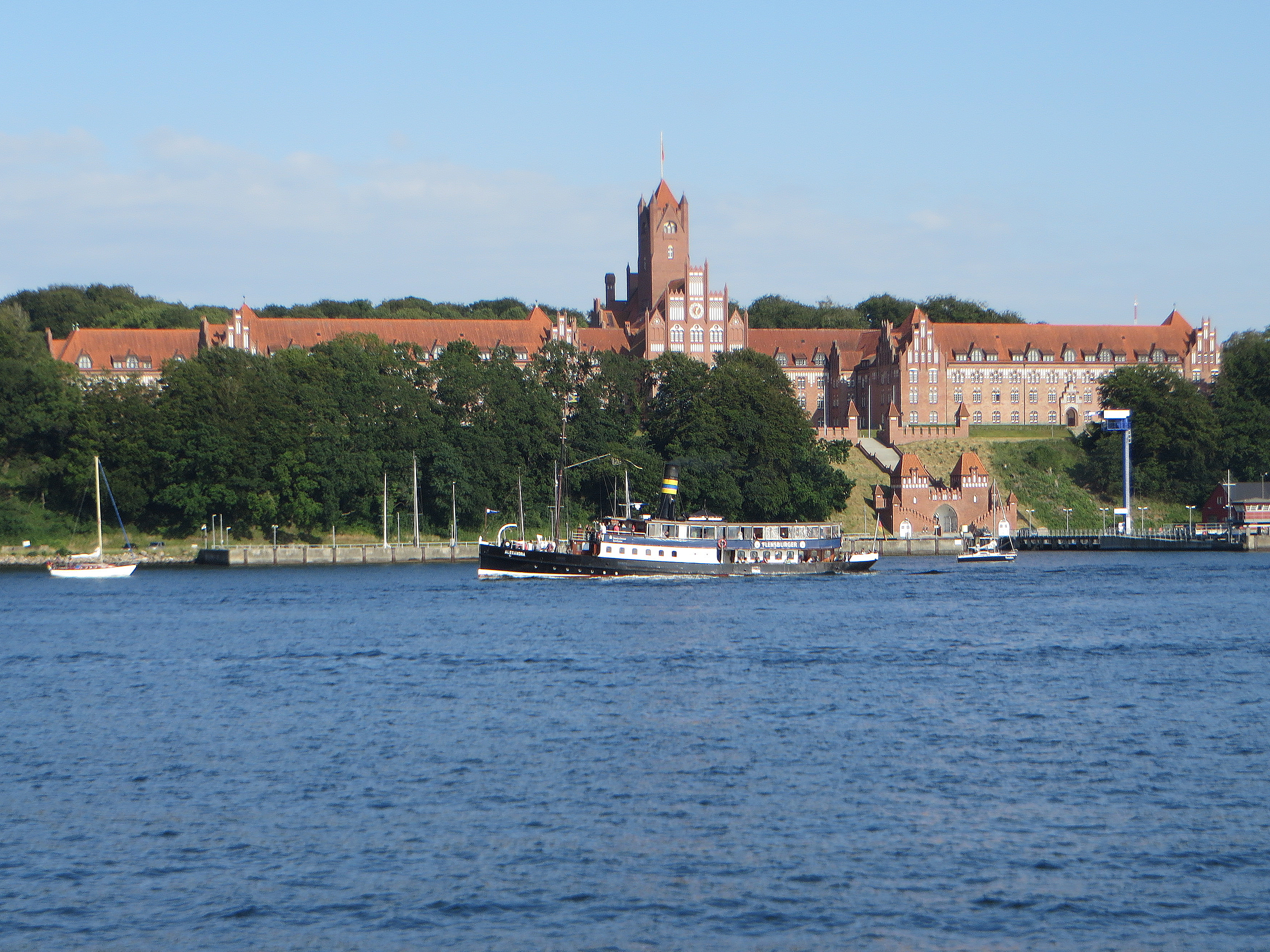 Alexandra vor dem Roten Schloss (Flensburg-Mürwik 2015), Bild 04; Bild entstand während des Dampf Rundums 2015